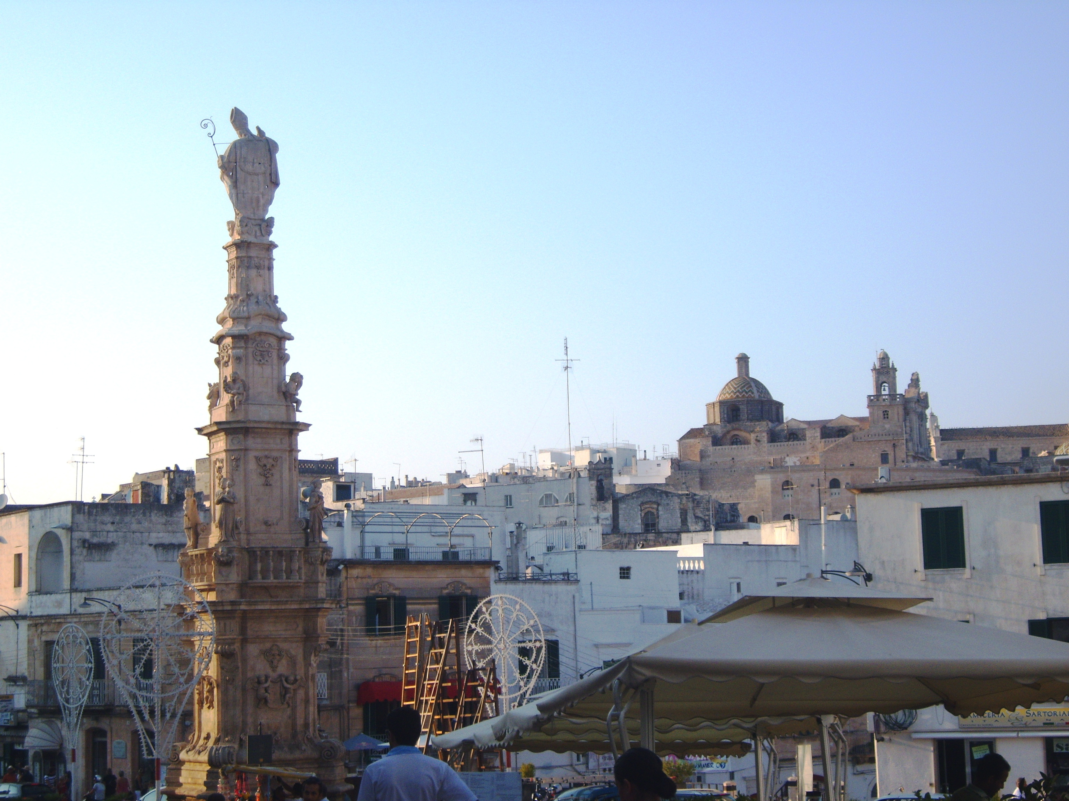 Ostuni (BR) - Colonna di Sant'Oronzo e veduta della città